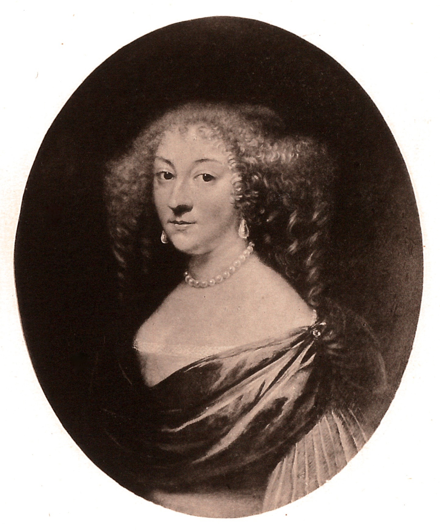 Elisabeth Augusta (1623-1677), datter af Christian IV og Kirsten Munk. Fra E. F. S. Lund: Danske malede Portræter, En beskrivende Katalog, 1897-1912